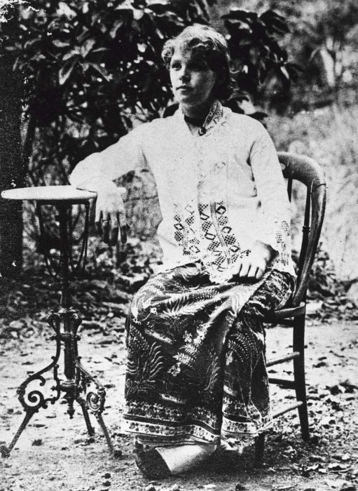 Foto. Mevrouw Mertens in sarong en kabaja, Java